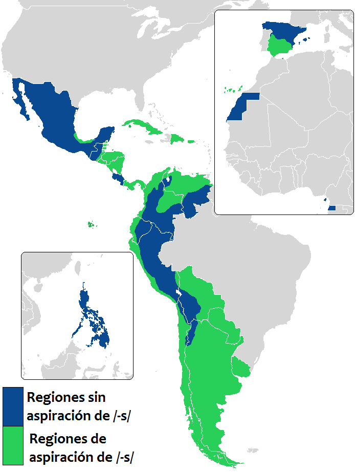 Áreas de aspiración de la /s/ en el dominio del español Fuente: Aspiración en español